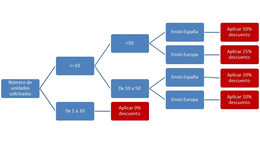 ejemplo de árbol de decisión de descuentos para volúmenes de pedido